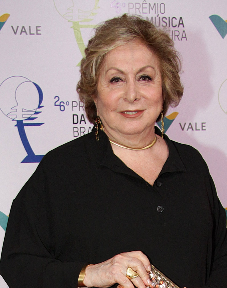 Aracy Balabanian - 26° Prêmio da Música Brasileira 2015, no Theatro Municipal, no Centro do Rio de Janeiro/RJ. (10/06/15) Foto: Roberto Valverde/Divulgacão